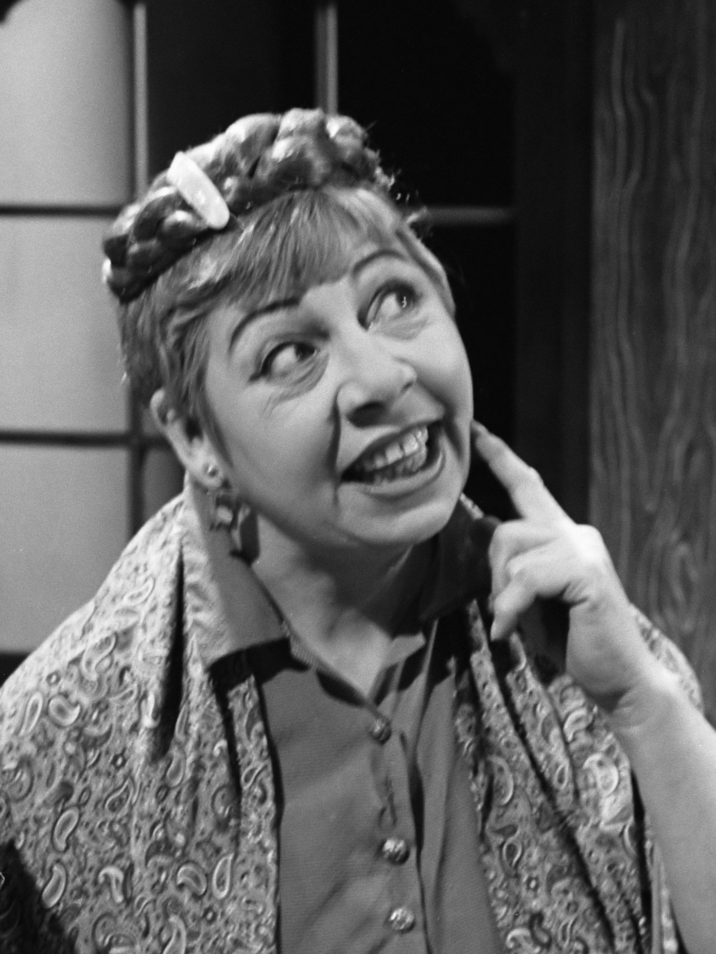 Televisiespel "Lijmen". Repetities. Elly van Stekelenburg 3 januari 1962